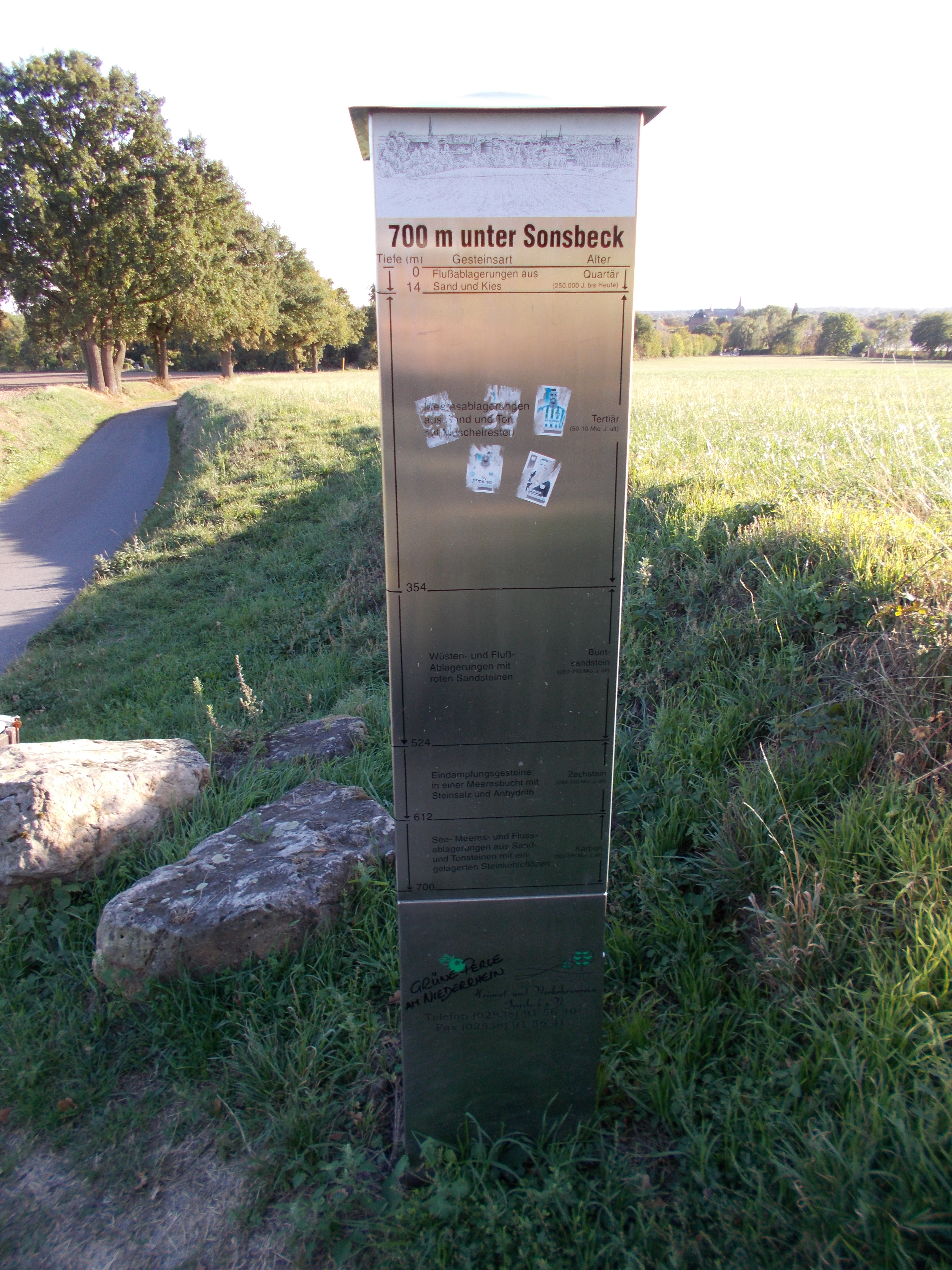 Infostation "700m unter Sonsbeck" am Geowanderweg.